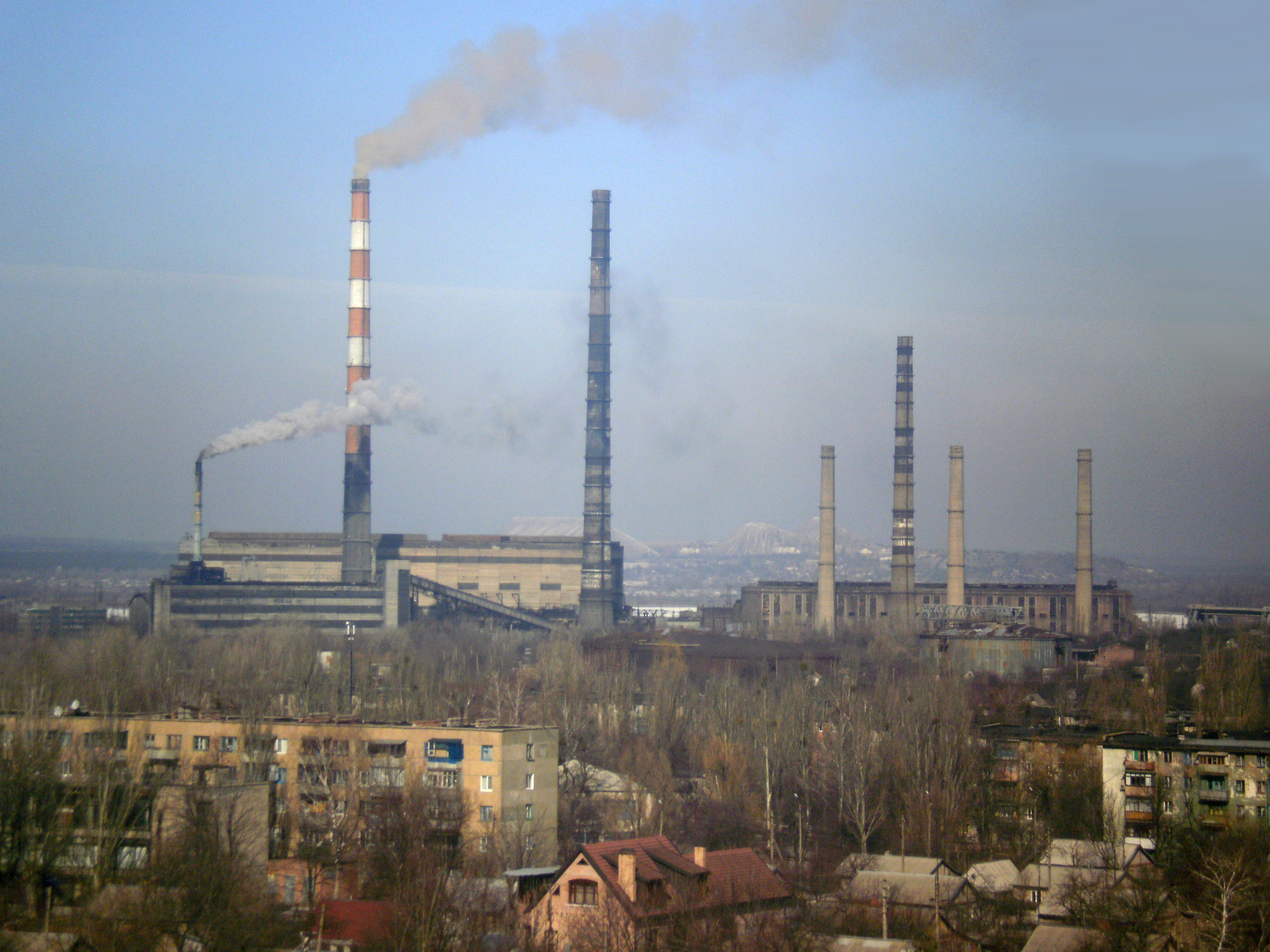 Славянская ТЭС с Николаевки